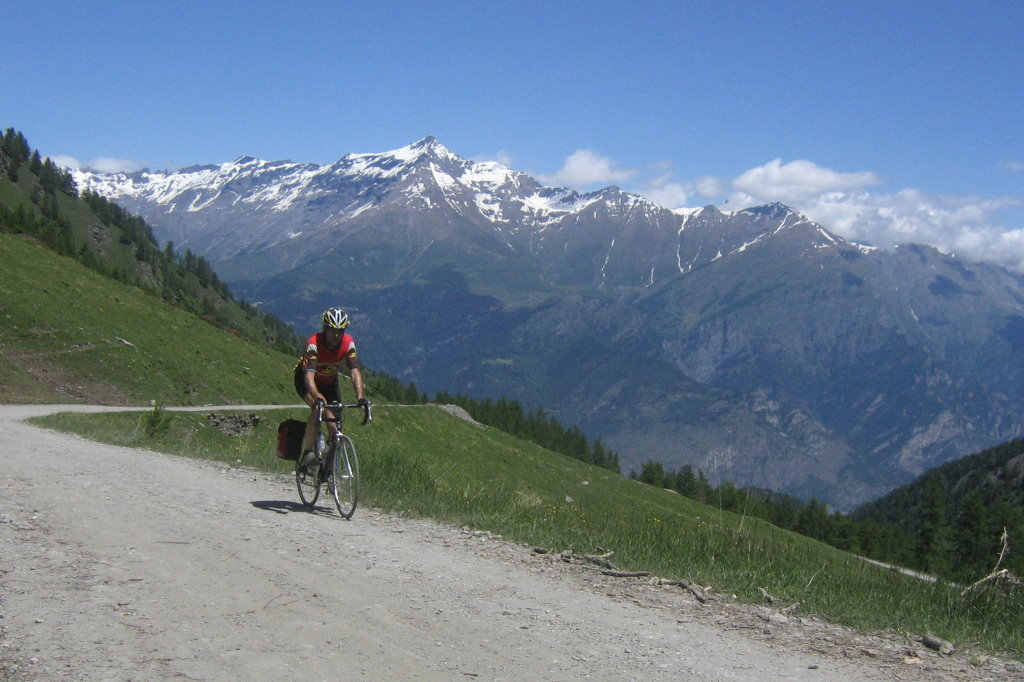 Nordrampe Colle delle Finestre